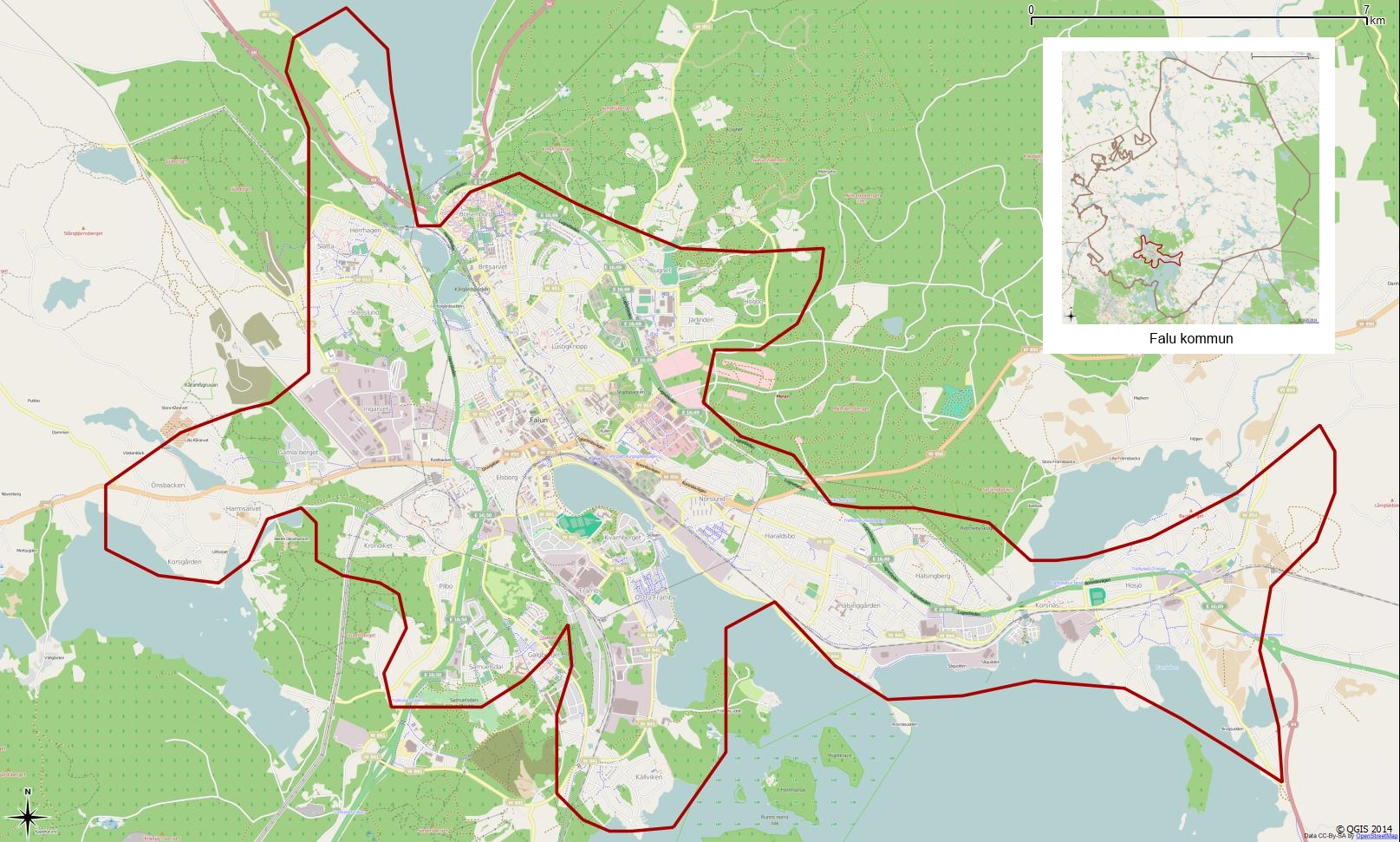 Tätorten Faluns gränser 1990 enligt Atlas över rikets indelningar 1992.